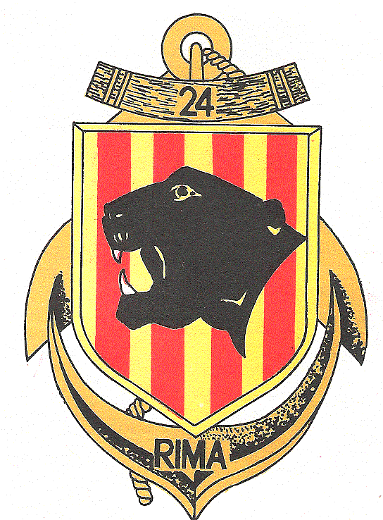 insigne régimentaire du 24e régiment d'Infanterie de Marine